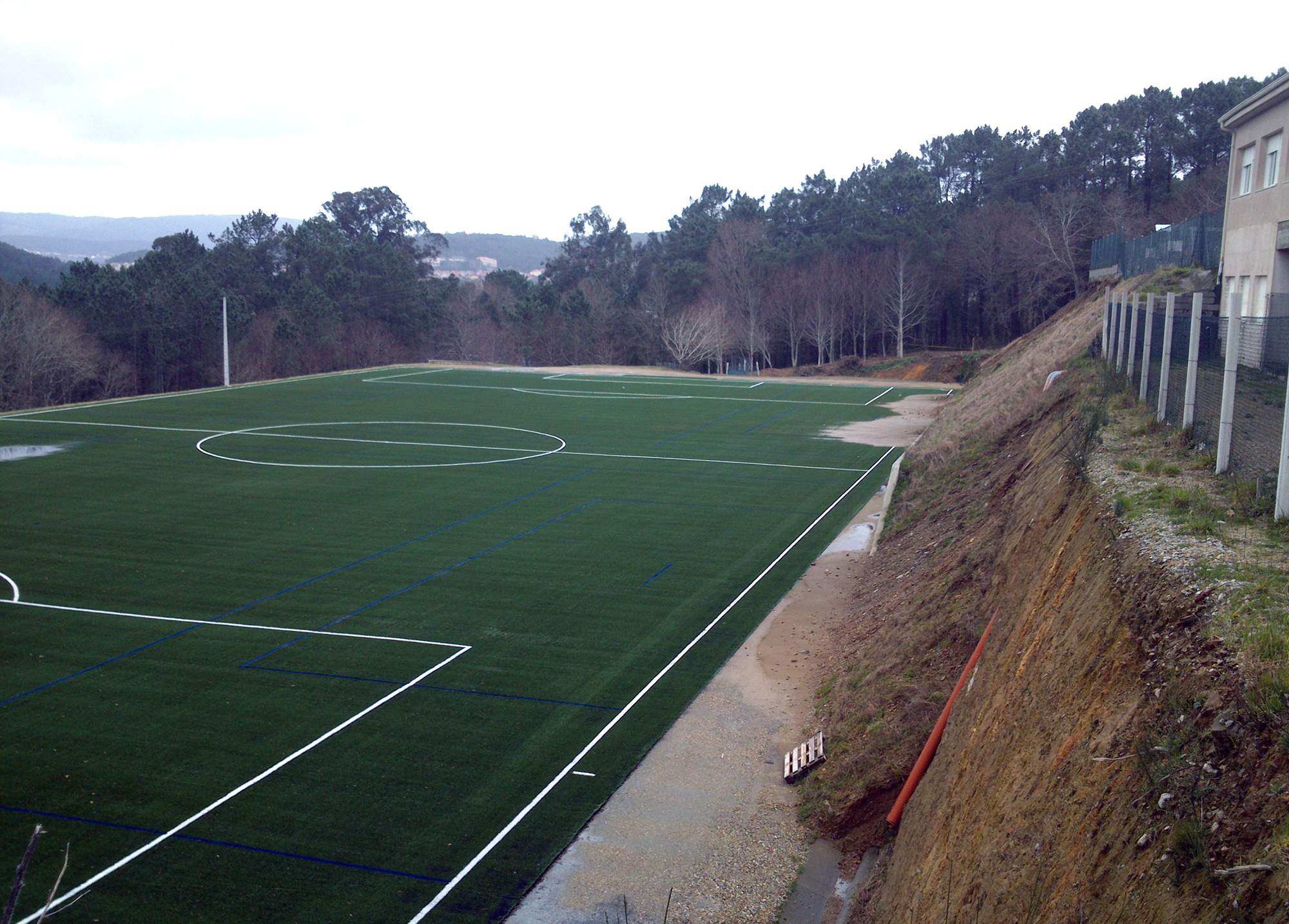 Campo de Futbol do Cruido en na Silva, Lousame